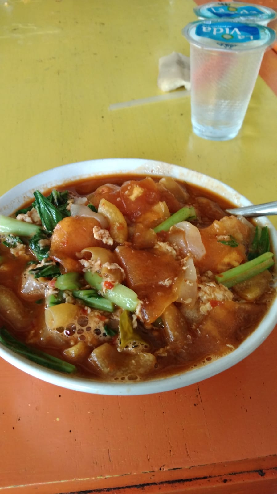 Seblak merupakan makanan favorit siswa SMAN 2 ketika cuaca sedang dingin-dinginnya